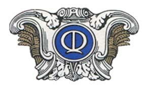 Blason de la ville de Marsillargues